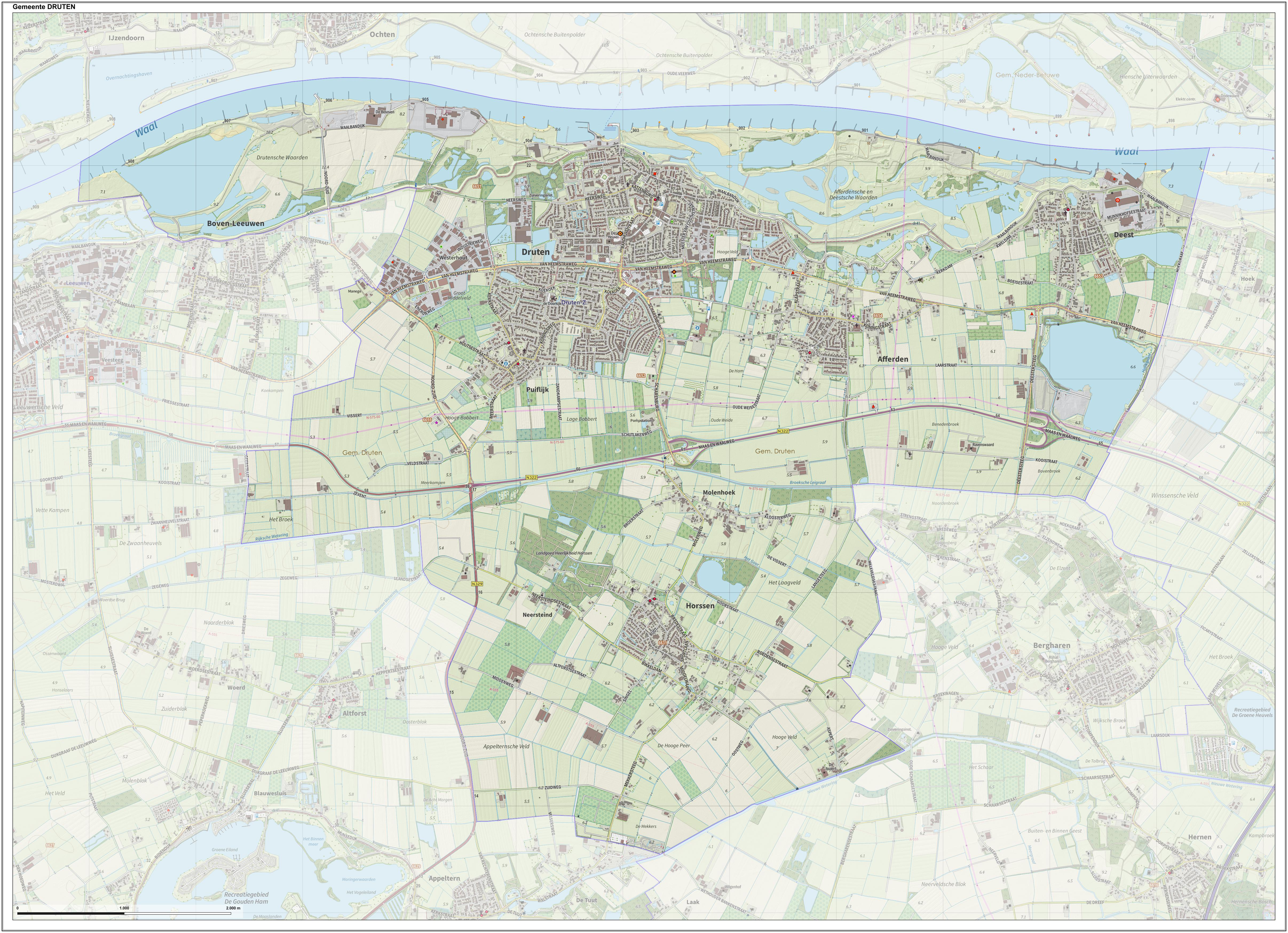 Topografische gemeentekaart. Resolutie: 400 pixels/km. Kaartbeeld samengesteld uit de open geodata van de Top10NL en Top25namen (Kadaster), Creative Commons-BY licentie. Gebouwvlakken uit open geodata BAG extract. Wegen uit de OpenStreetMap, OpenStreetMap community. Reliëfschaduw uit de Actuele Hoogtekaart AHN2. Samenstelling en kleurenschema: Jan-Willem van Aalst, met QGIS. Zie ook de Legenda.